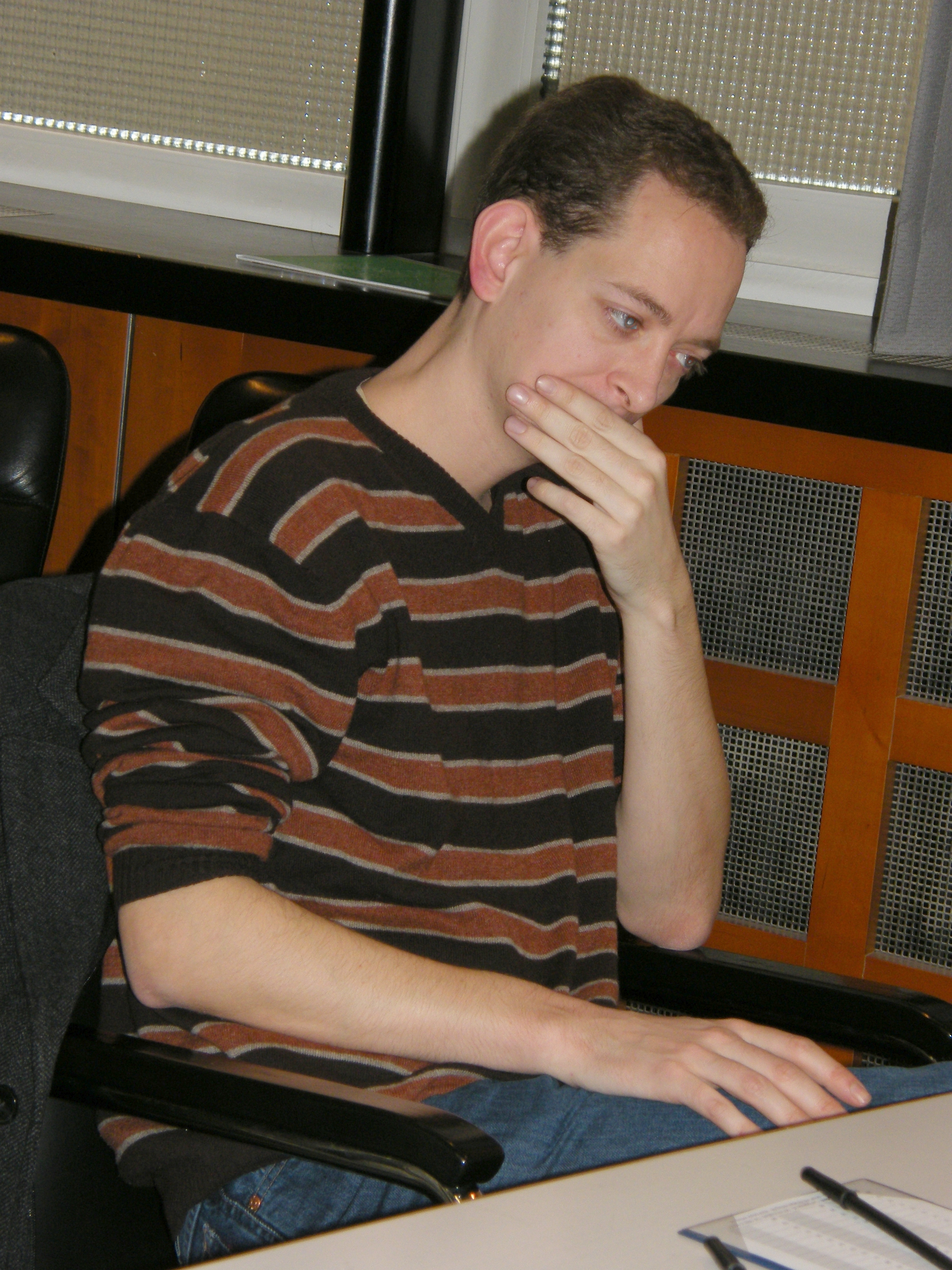 Arnd Lauber bei der 3. Runde der Schach-Bundesliga 2008/09 im Rathaus Schöneberg in Berlin